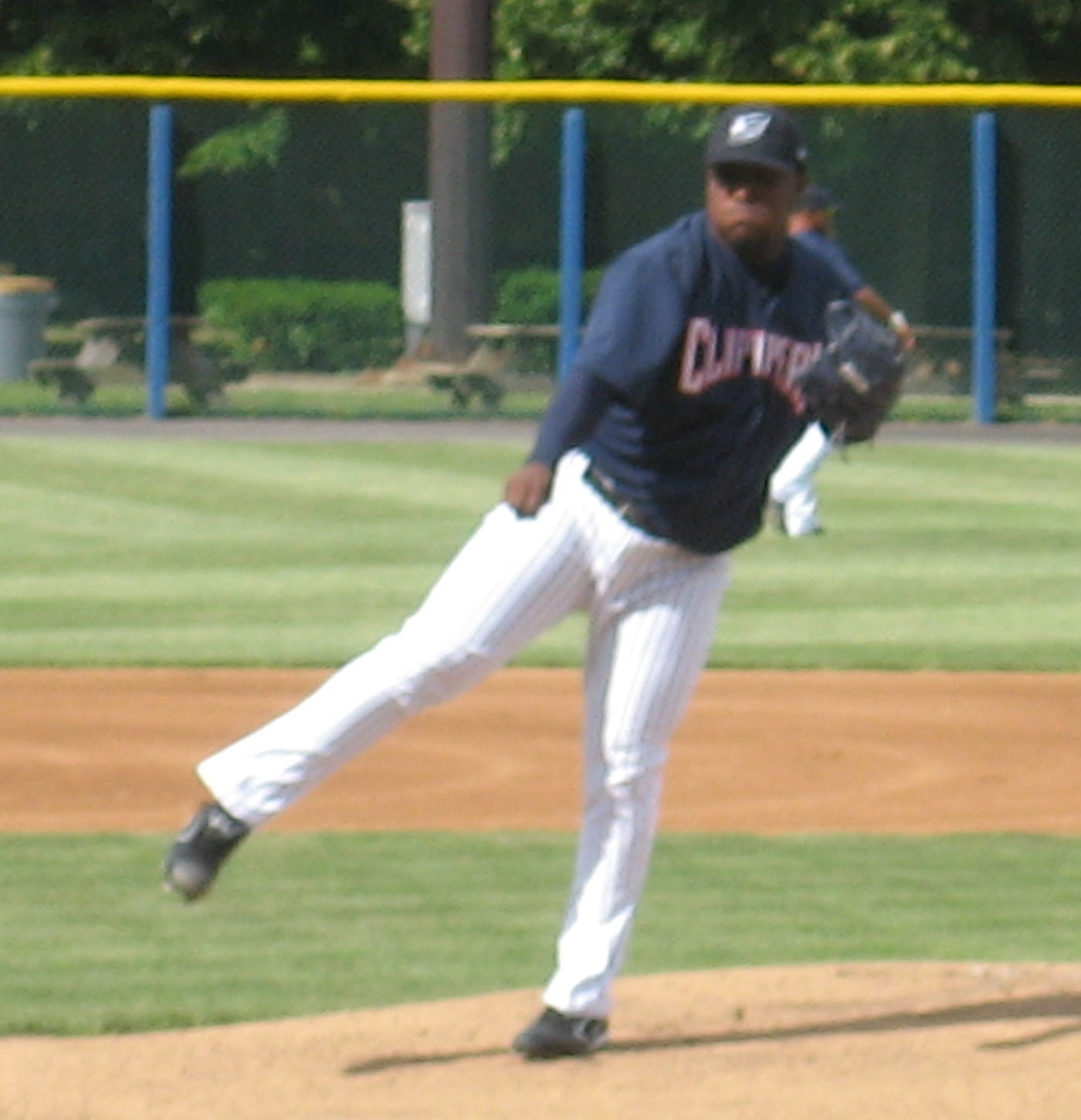 Emiliano Fruto